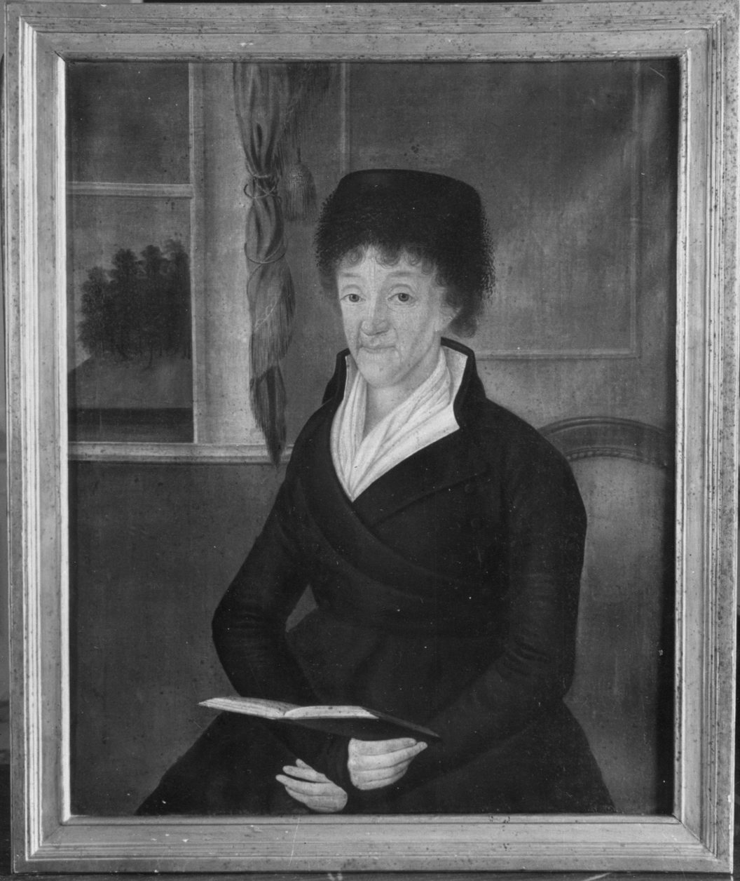 Oljemaleri av Amborg Aall, repro: Norsk Folkemuseum M 471 og Væring, Norsk portrettarkiv, Riksantikvaren